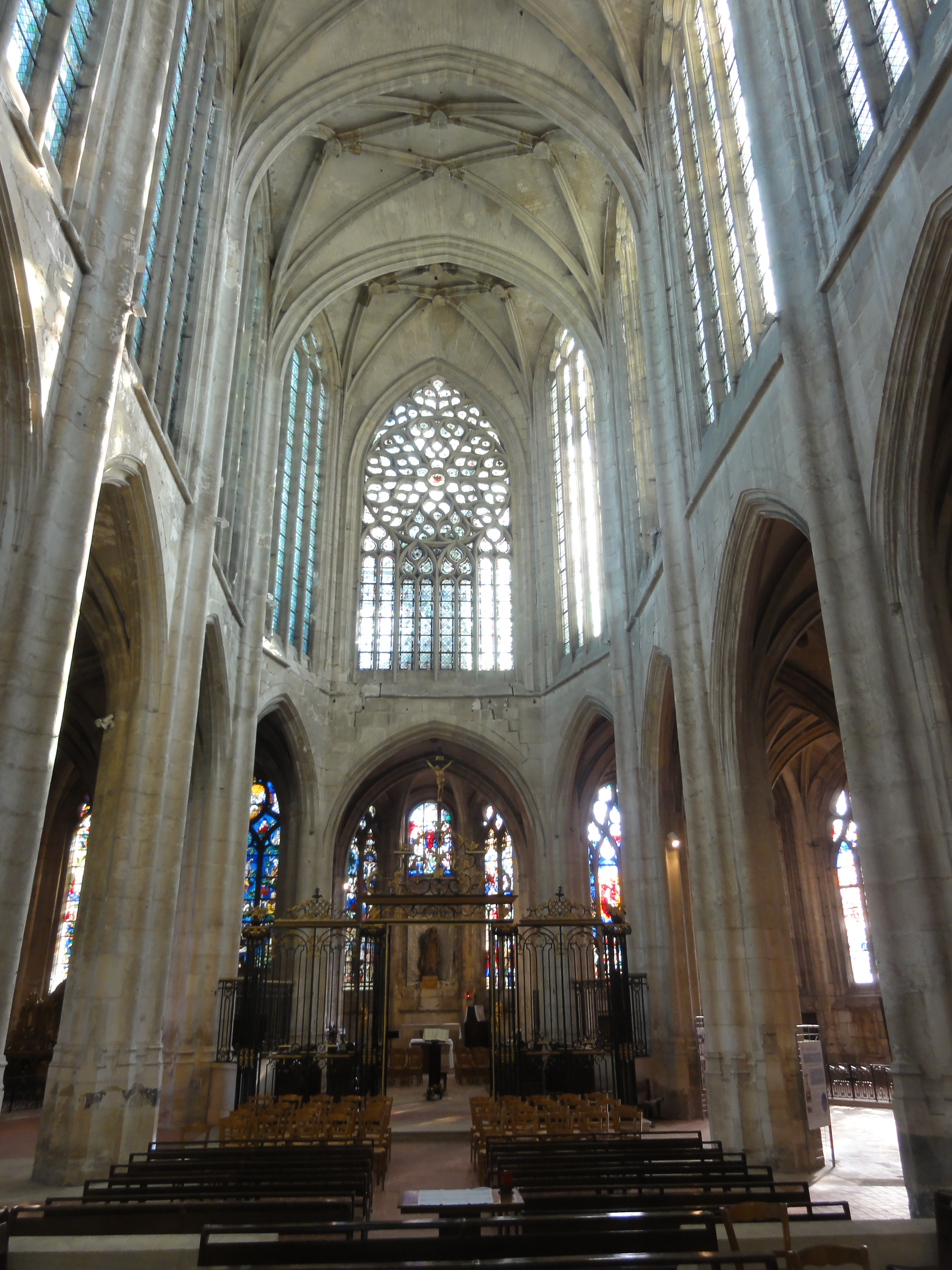 Chœur.